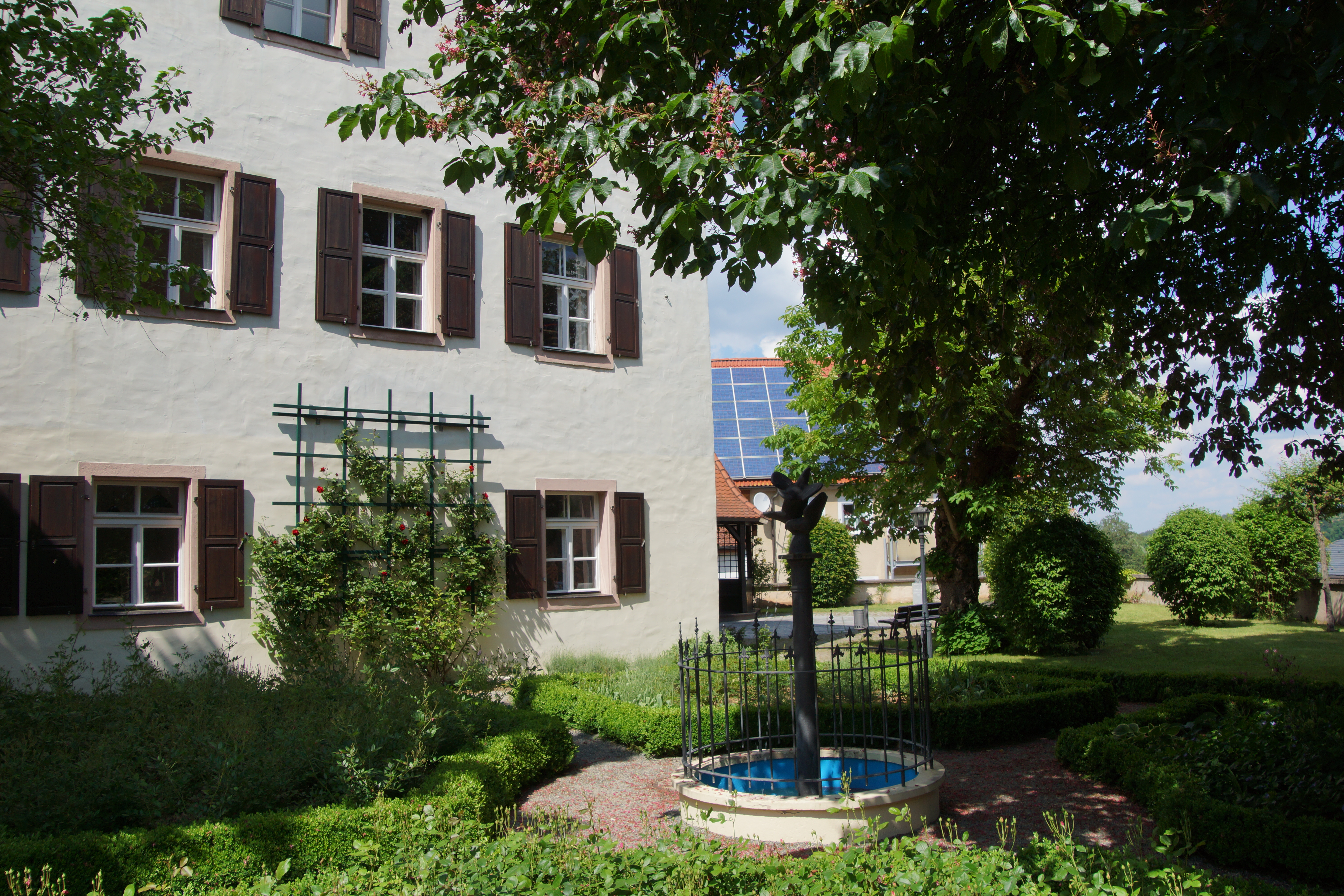 Das sogenannte alte Schloss in Pleinfeld